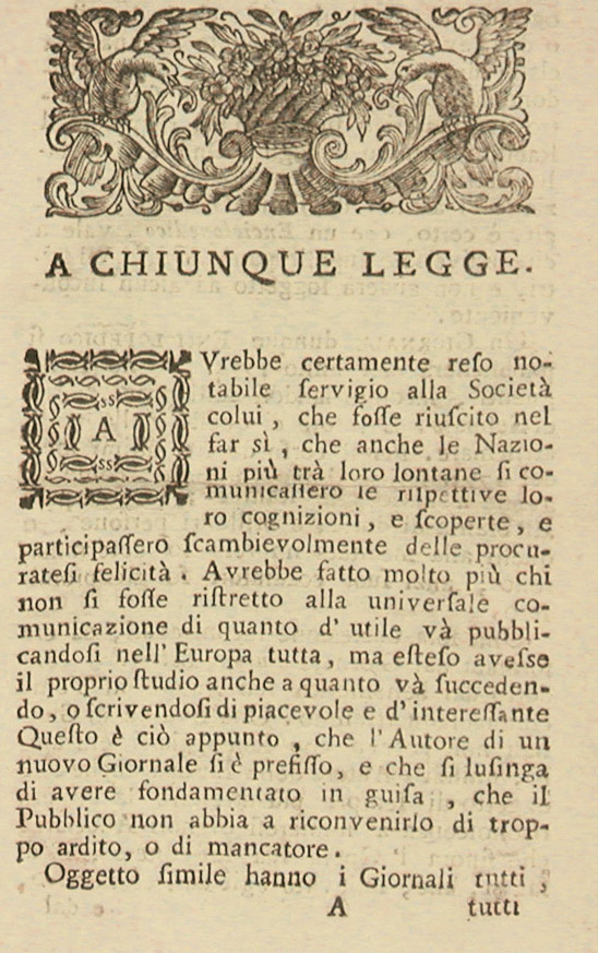 Giornale Enciclopedico edito da Elisabetta Caminer Turra (Venezia, 1751 - Orgiano, 1796), Stamperia fenziana, Venezia, pagina interna